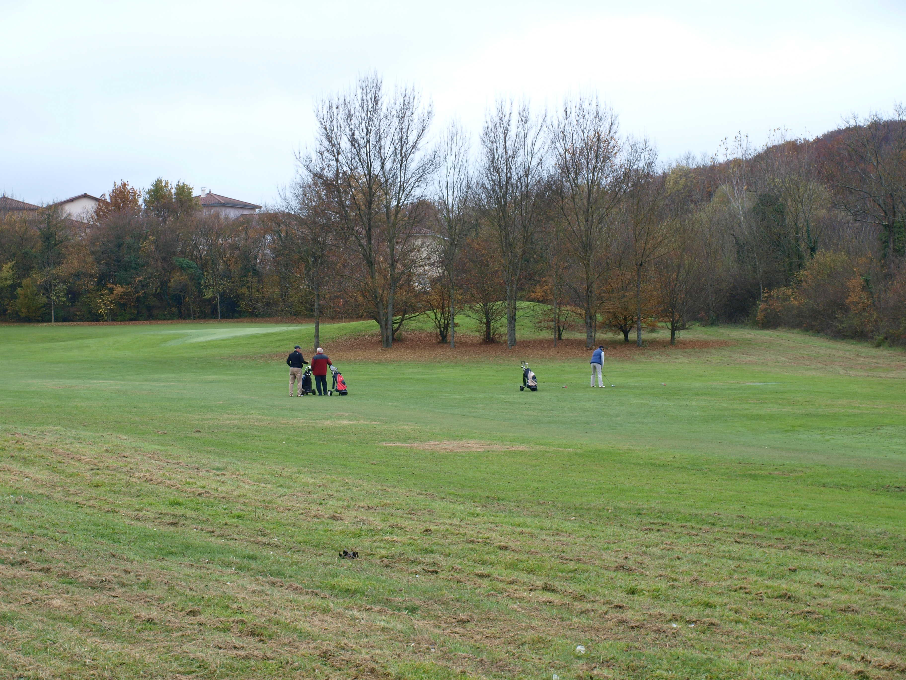 L'Isle-d'Abeau (Isère, France) ; golf.